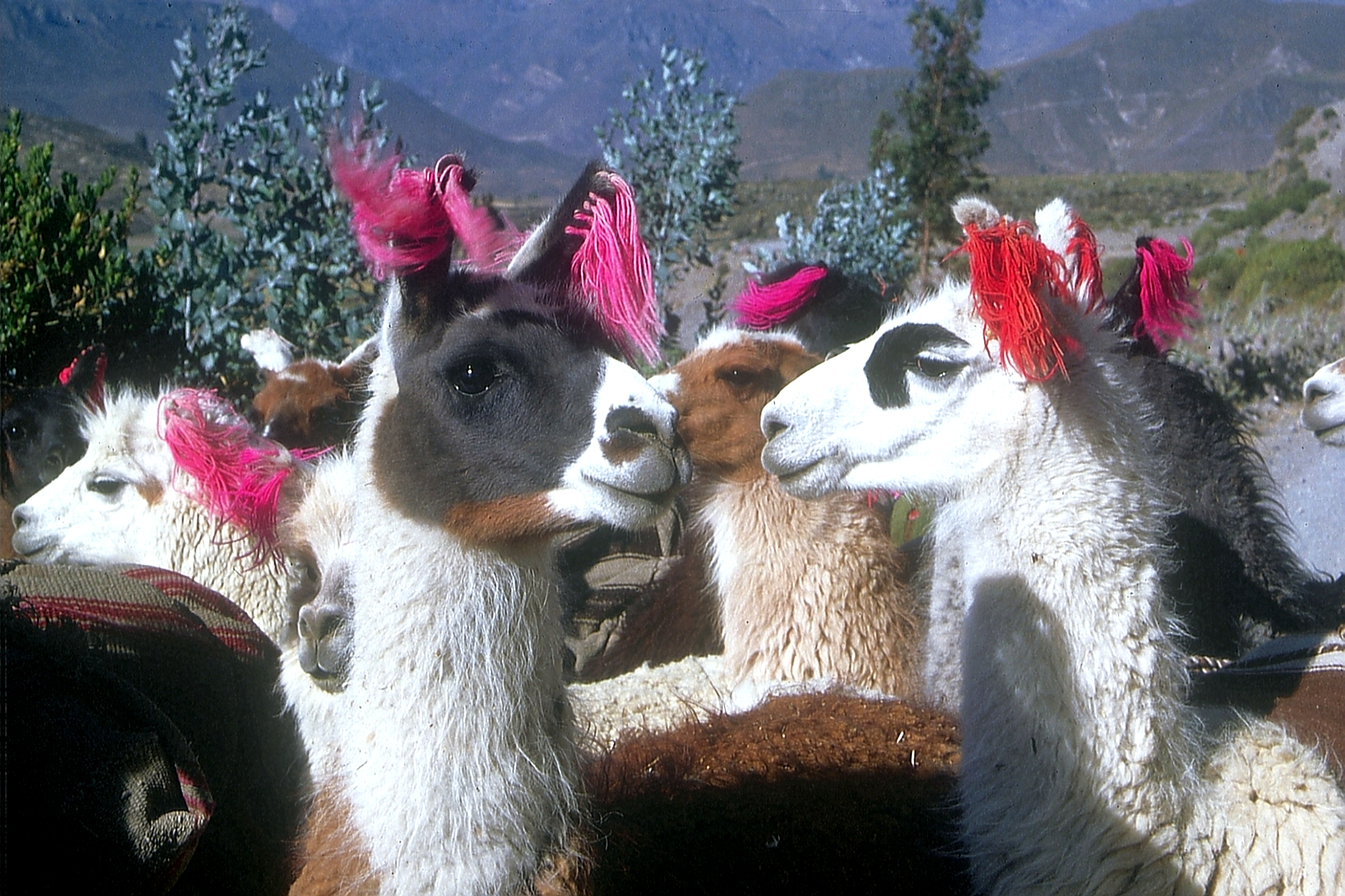 Lamas im Colcatal (Peru) mit Eigentümer-Erkennungsmerkmal in den Ohren